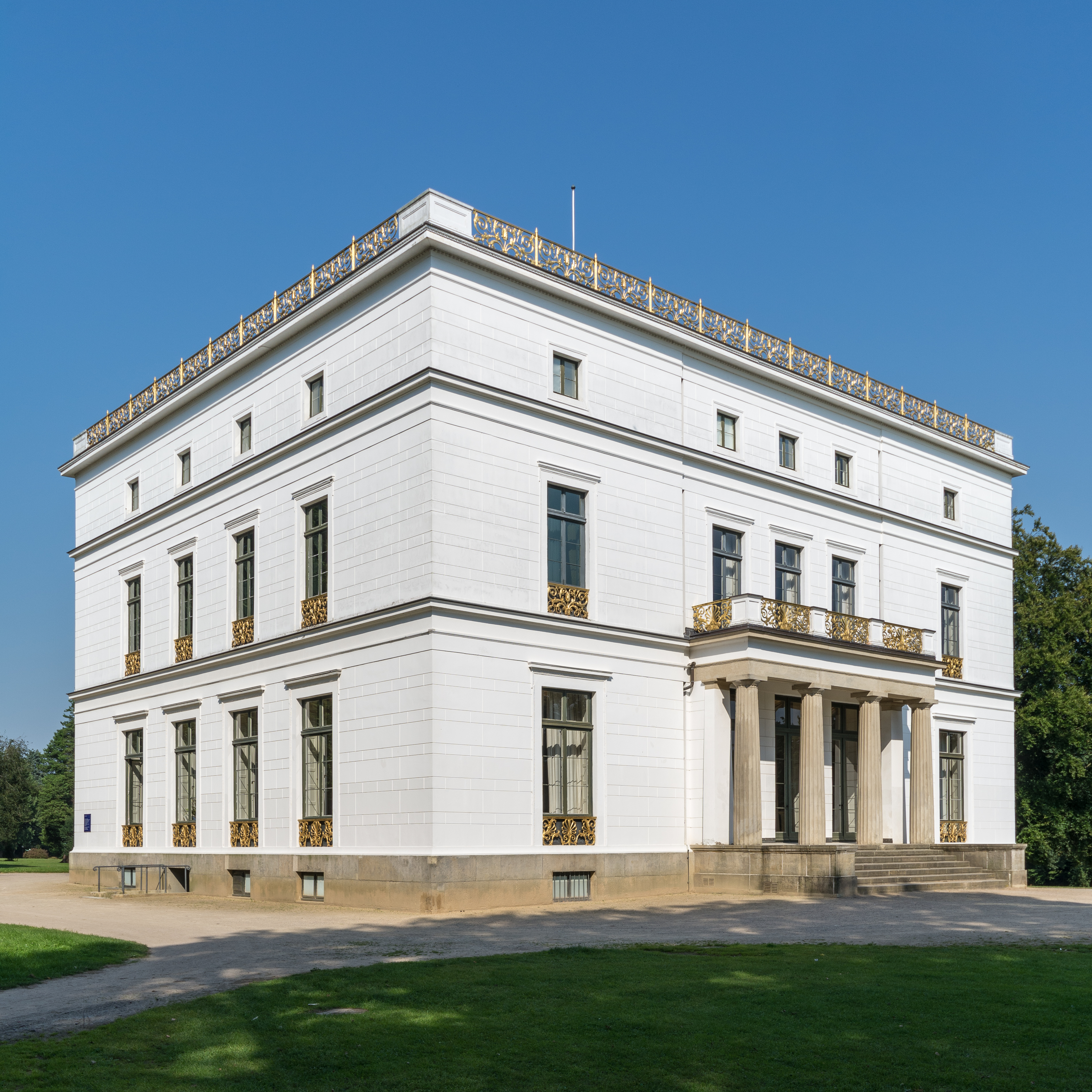 Jenischhaus in Hamburg-Othmarschen. This is a photograph of an architectural monument.